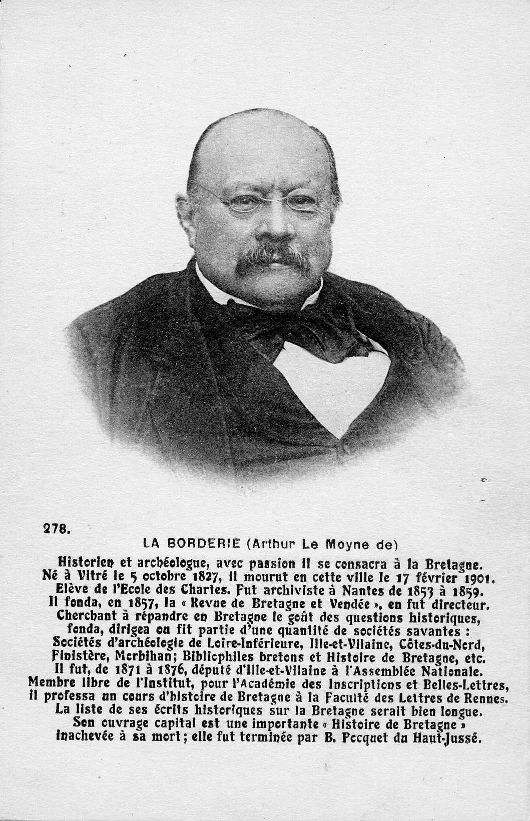 Portrait d'Arthur Le Moyne de La Borderie (1827-1901), historien. Carte postale F. Château, conservée aux Archives de Rennes, 100 Fi 455